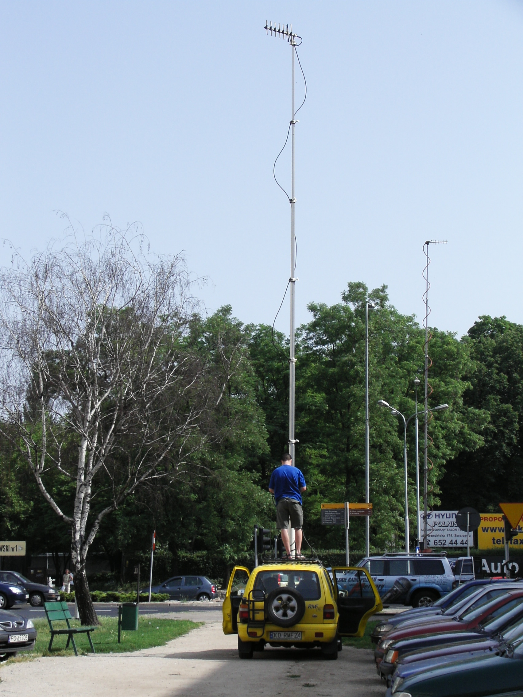 Wóz reporterski RMF - montaż anteny.